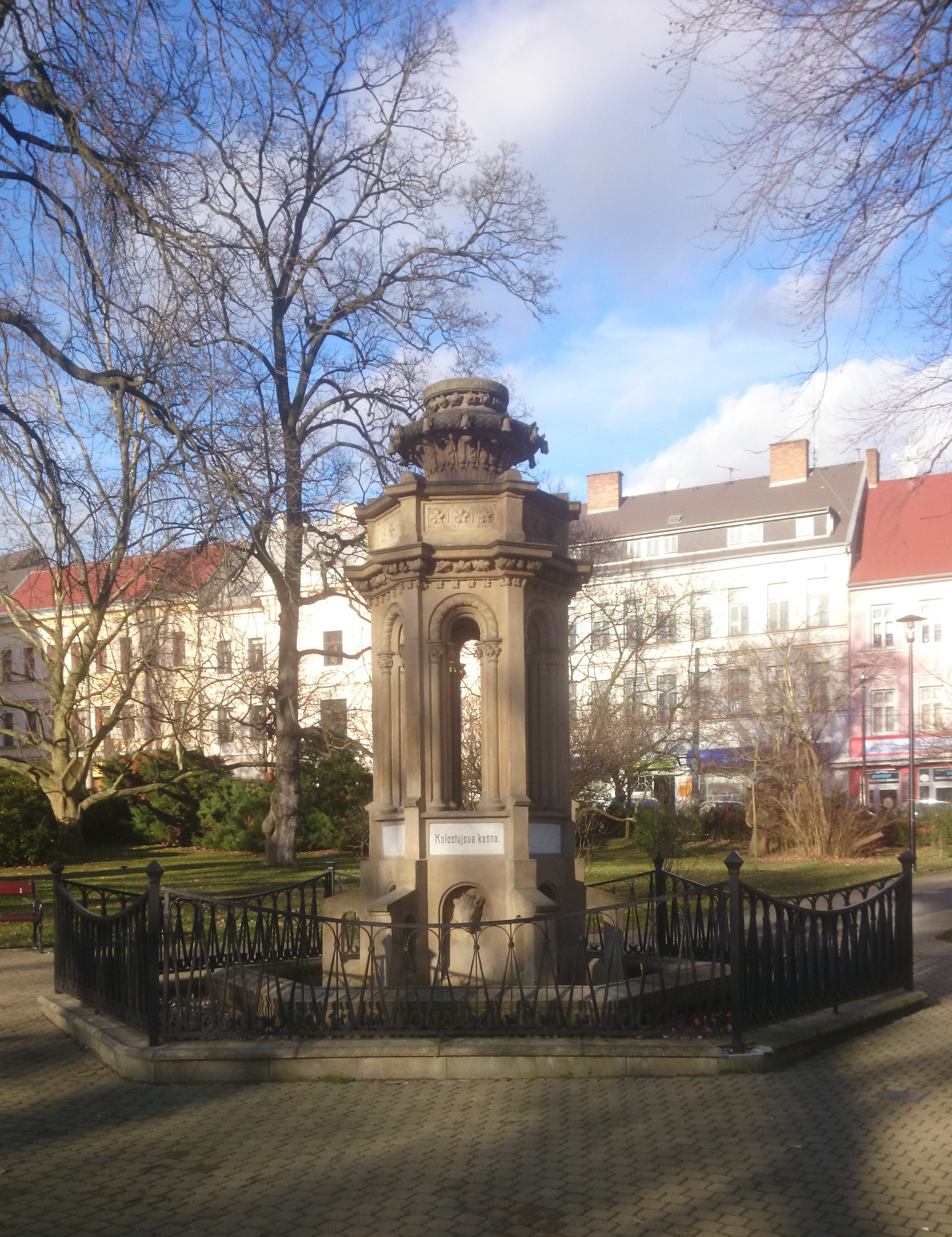 Jubilejní (lidově Kolostůjova) kašna v Teplicích mezi Císařskými lázněmi a divadlem